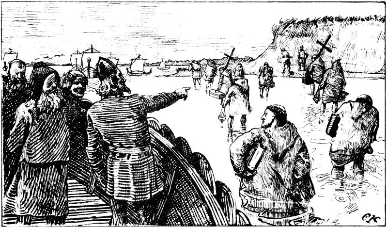 Christian Krogh: Illustration for Olav Tryggvasons saga, Heimskringla 1899-edition. nn: «Håkon sette alle lærde menn opp på land.» nb: «Håkon jarl satte alle de lærde menn opp på land.»